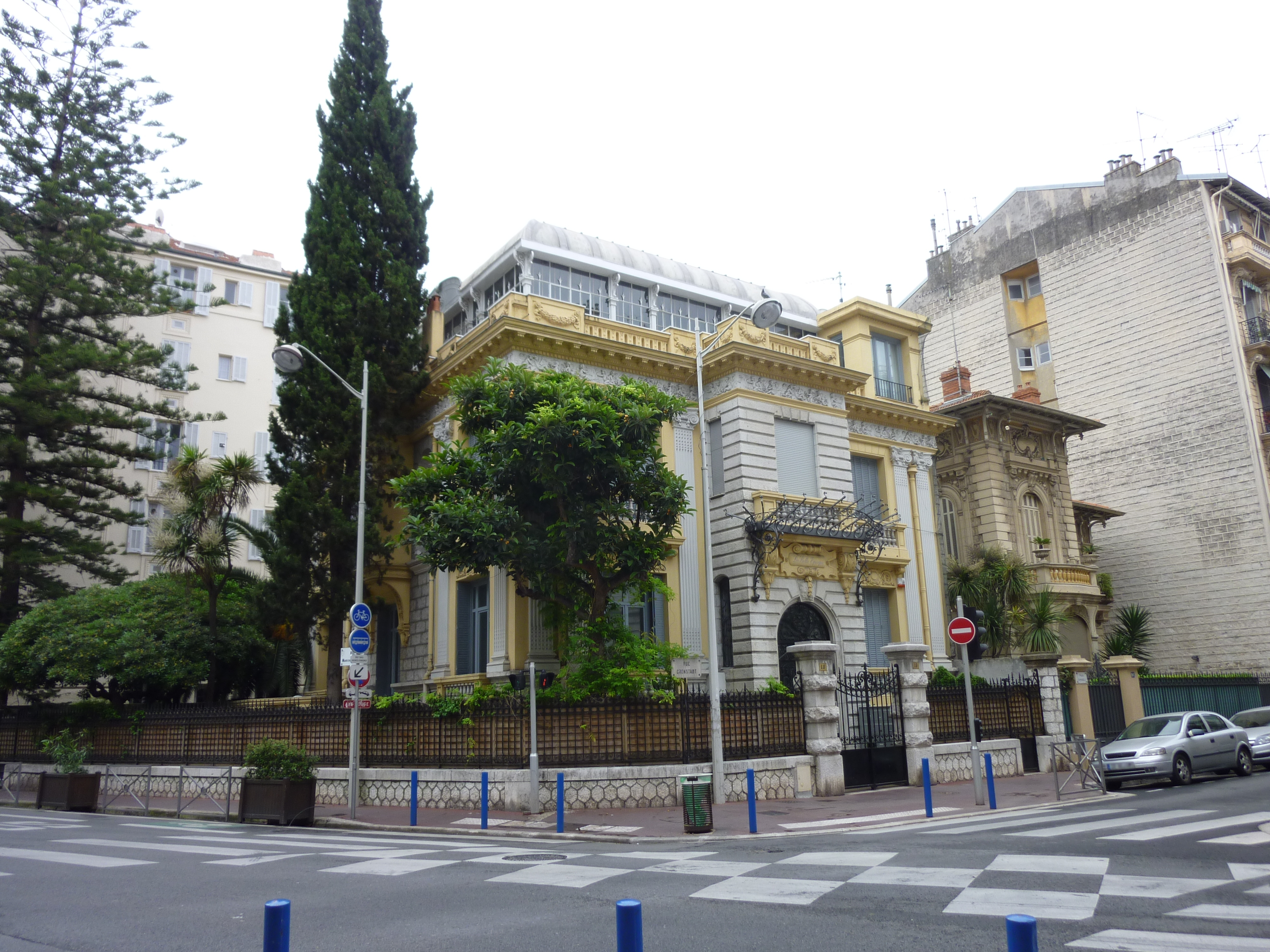 Villa La Belle Époque, (Nice, Alpes-Maritimes, France) .